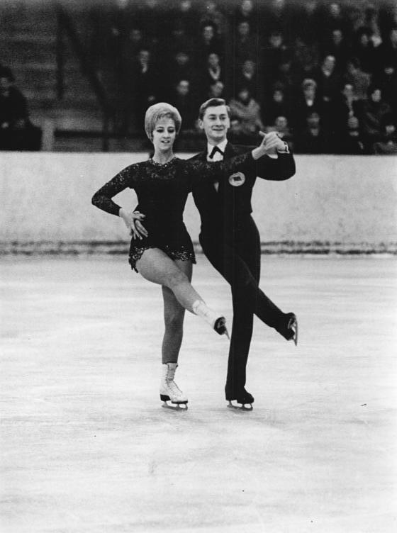 Diane Towler, Bernard Ford Zentralbild Gahlbeck 24.3.1966 Karl-Marx-Stadt: Eiskunstlaufen-Internationales Schaulaufen Umjubeltes Weltmeisterpaar. Exakt und schwungvoll in ihren Darbietungen-so stellten sich Diana Towler und Bernard Ford (Großbritannien), die Titelträger im Eistanzen der Davoser Weltmeisterschaften, in Karl-Marx-Stadt beim internationalen Schaulaufen am 23 und 24.3.1966 vor. In Berlin gehen sie am 26. und 27.3.1966 bei den traditionellen Frühjahrsschaulaufen des DELV anden Start.